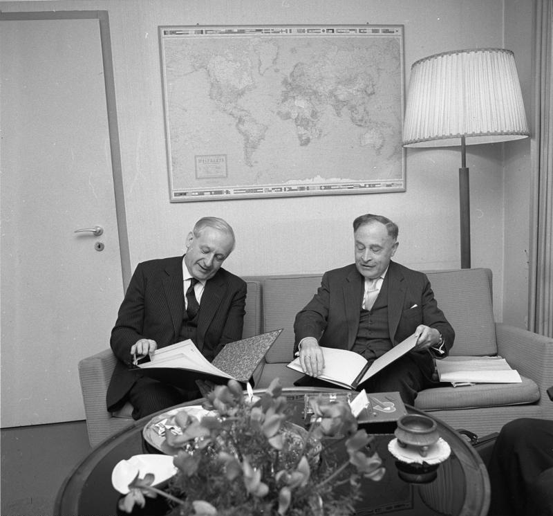 Austausch von Ratifikationsurkunden eines deutsch-irischen Gastarbeitervertrages im Auswärtigen Amt